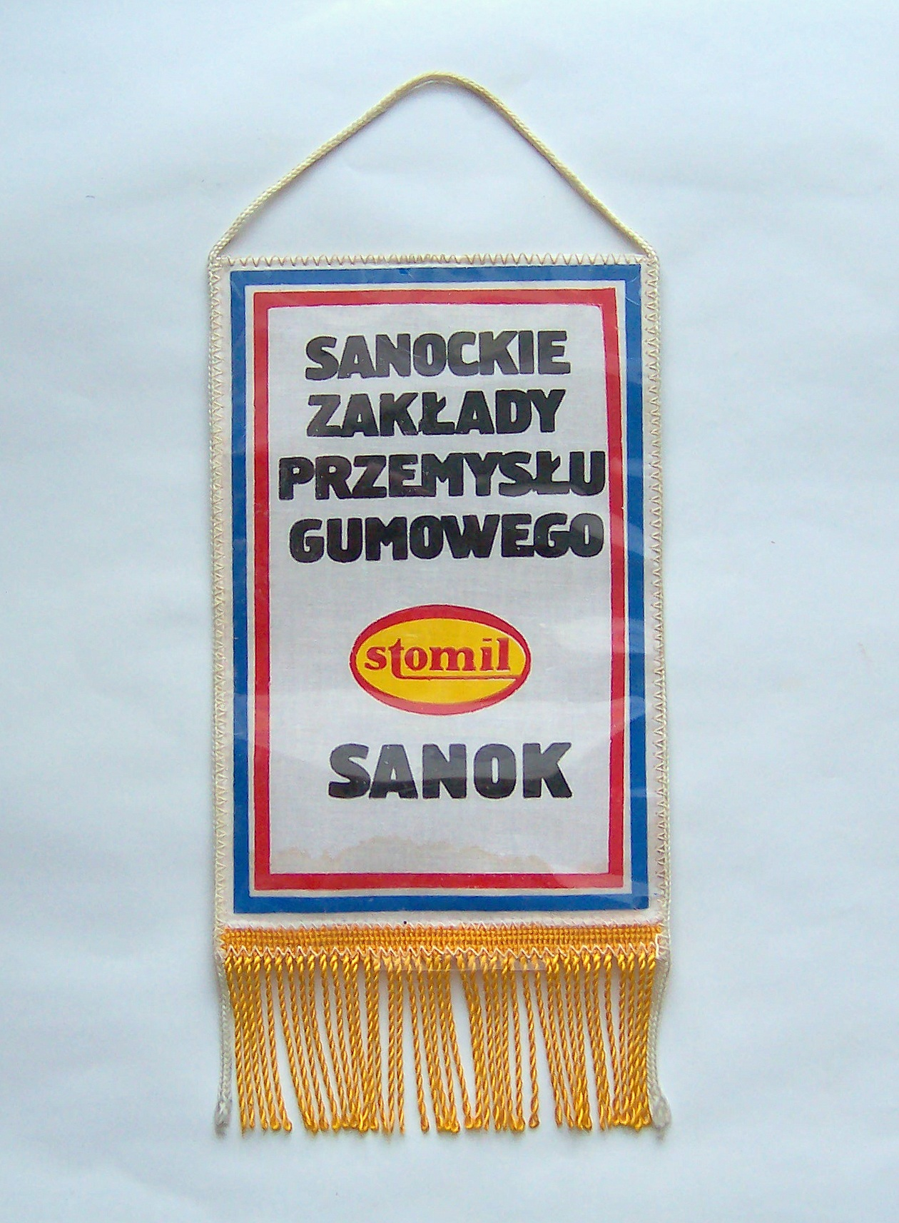 Proporczyk ZKS Sanoczanka Sanok i Sanockich Zakładów Przemysłu Gumowego Stomil Sanok sprzed 1989 roku.